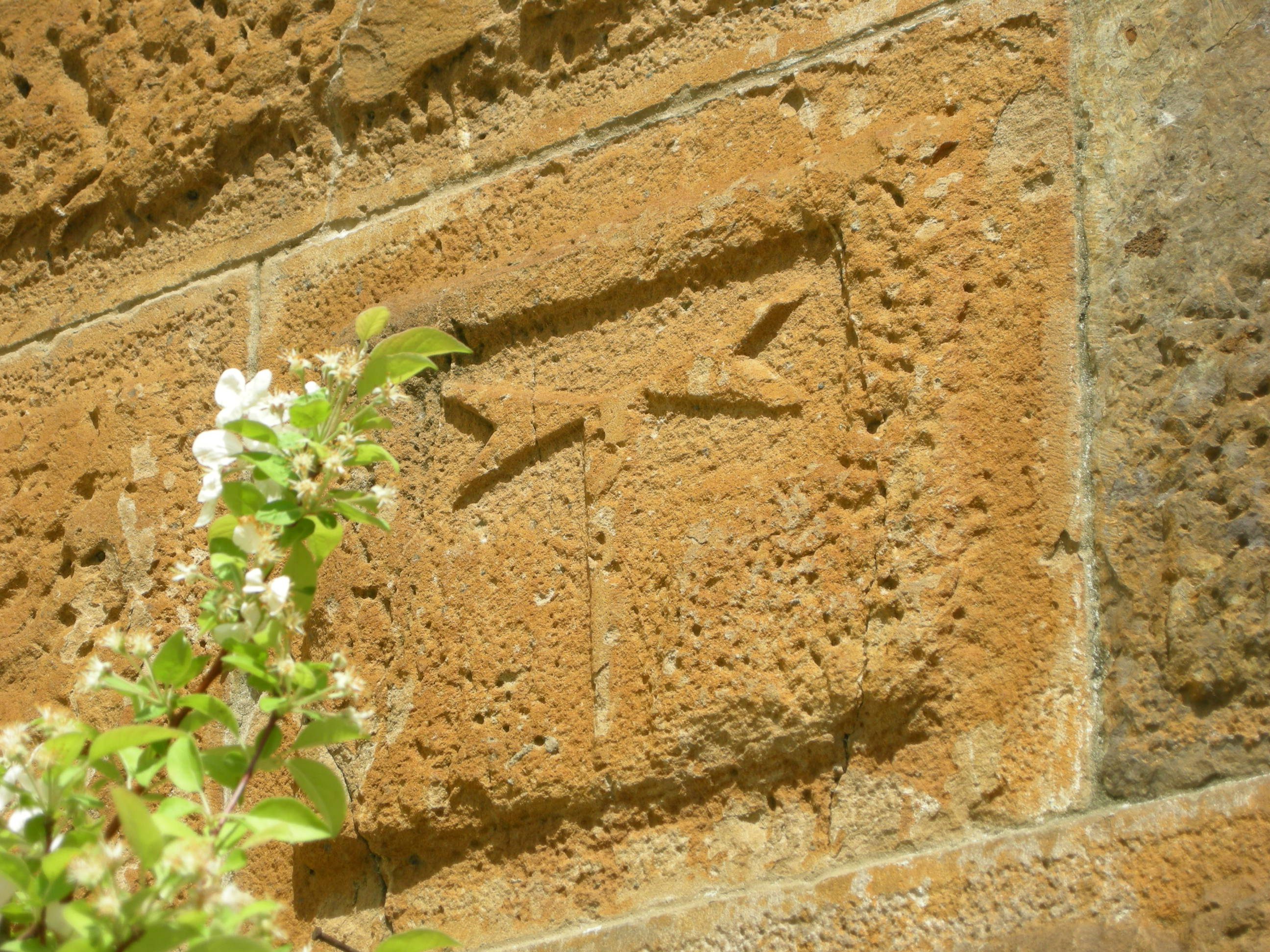 Altopascio, pieve di san jacopo, campanile 04 tau